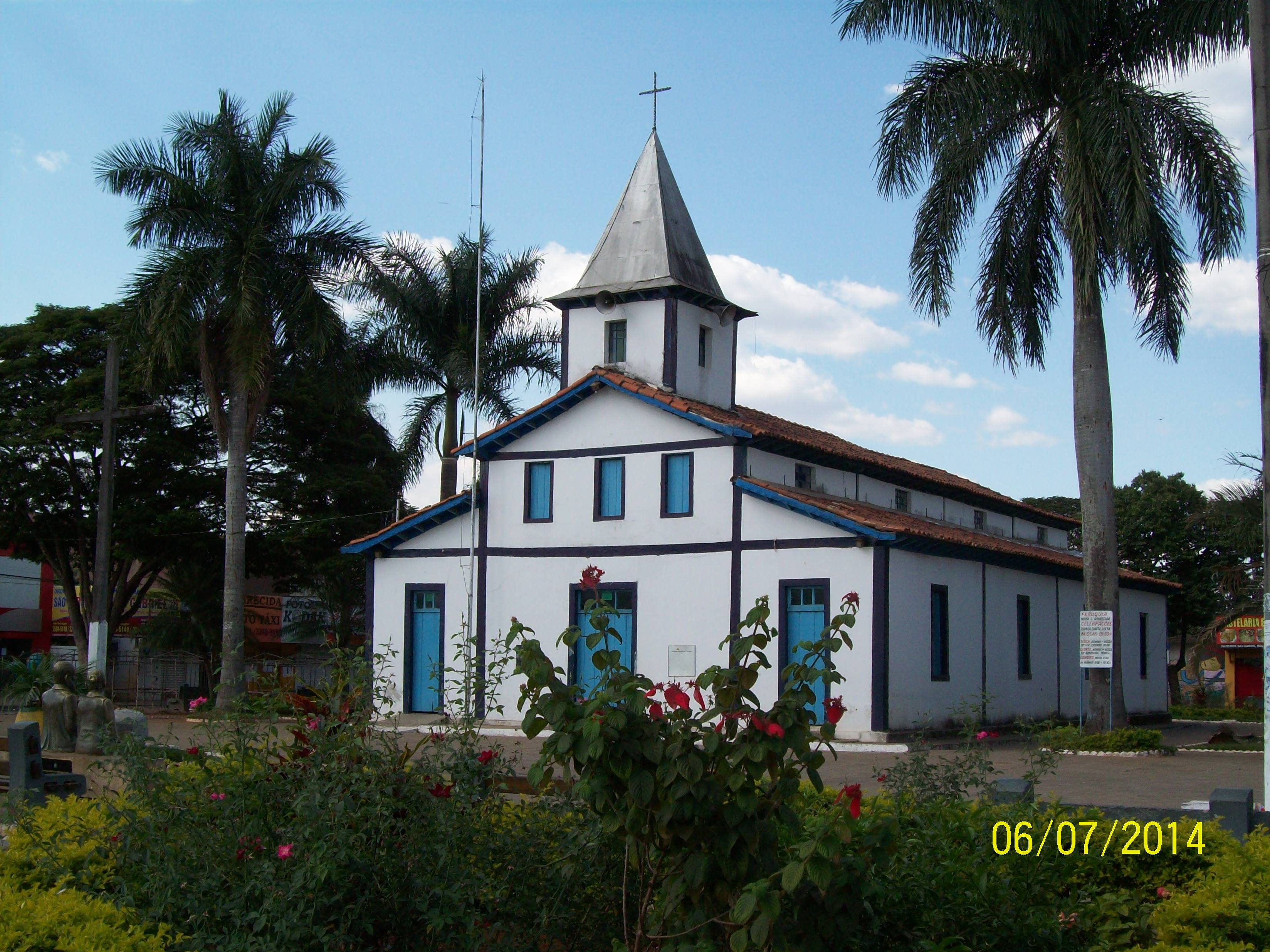 Aparecida de Goiania GO Brasil - Matriz